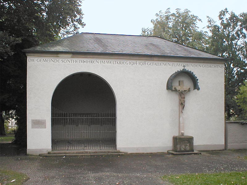 Kriegerdenkmal in Heilbronn-Sontheim, gestiftet 1933 durch Zwirnerei Ackermann, basiert auf einer Friedhofskapelle aus dem 18. Jhd.